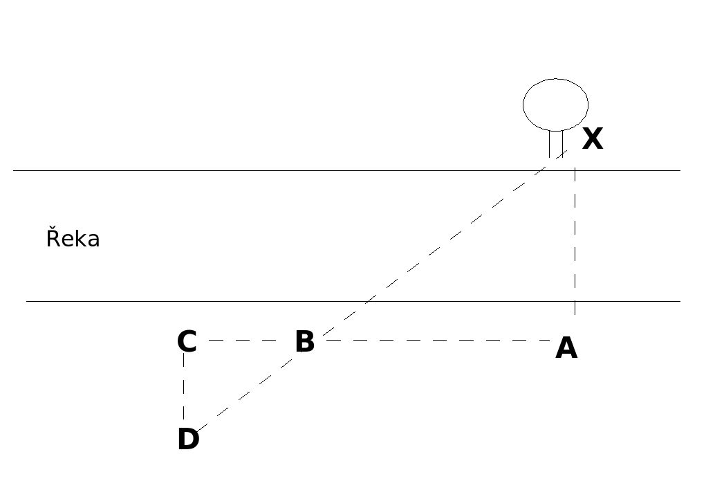 Náčrt k srozumitelnějšímu popisu změření šířky řeky